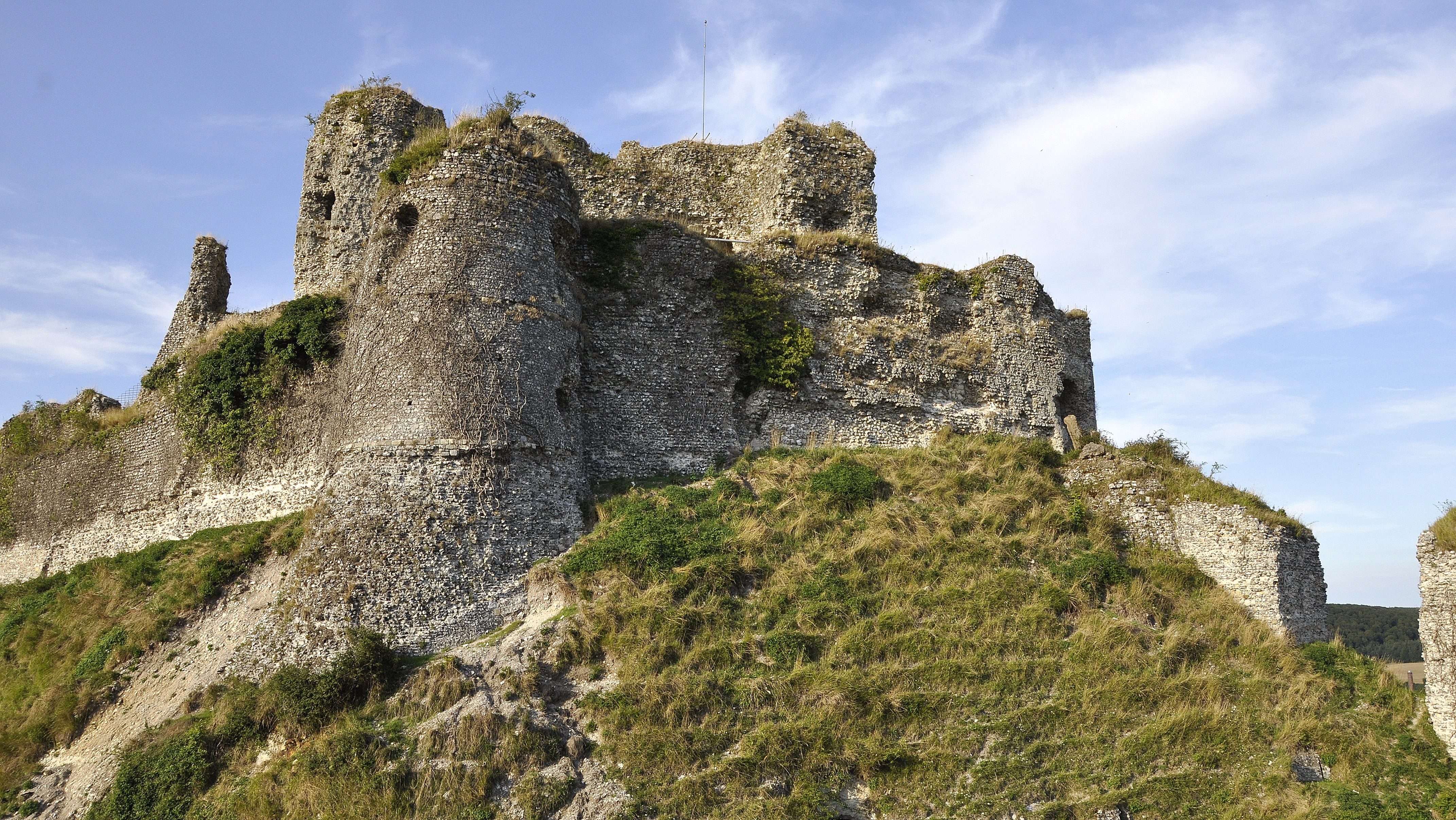 Het kasteel van Arques-la-Bataille, Frankrijk